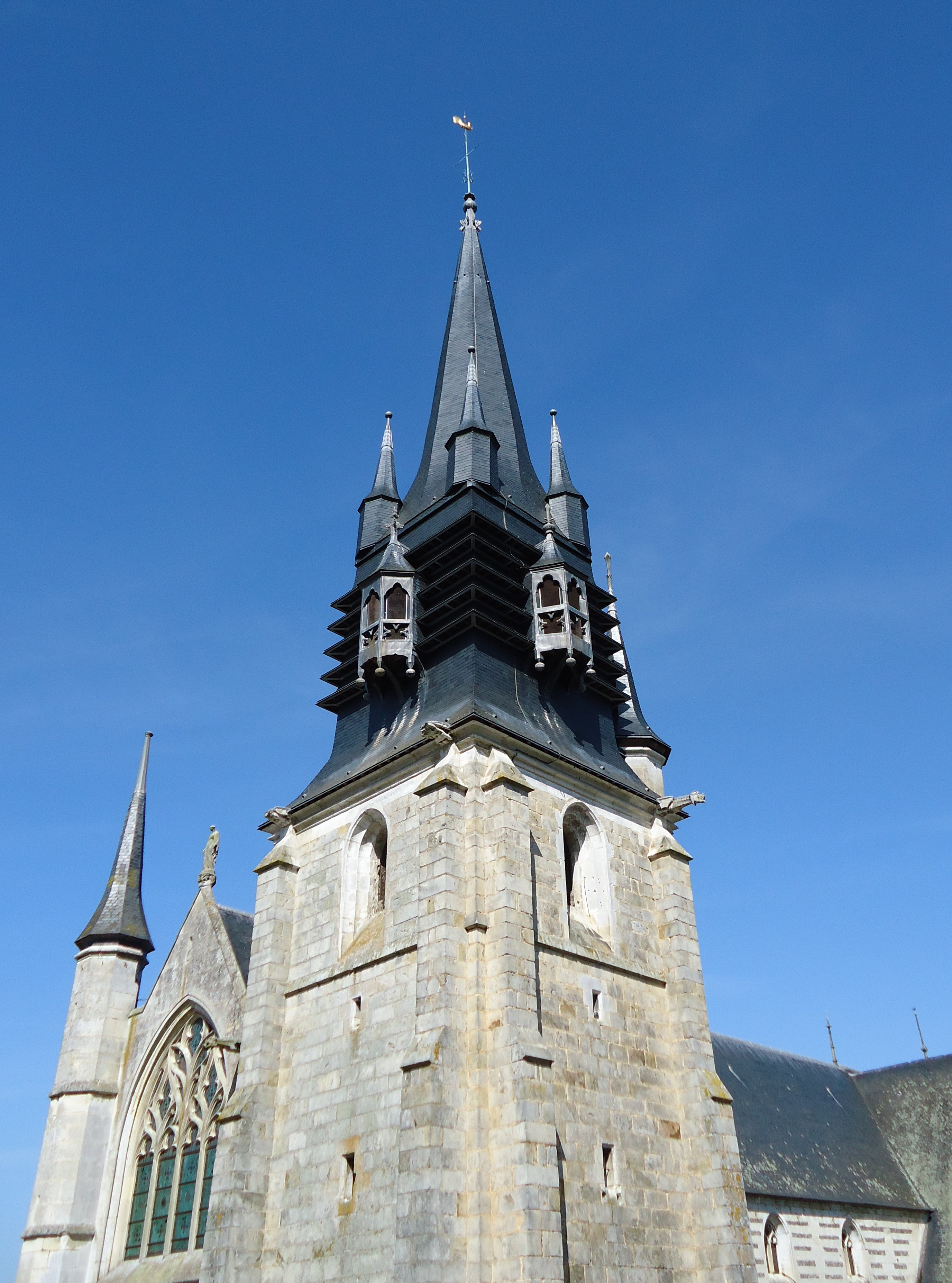 Bernay - Clocher de l'Église Notre-Dame-de-la-Couture